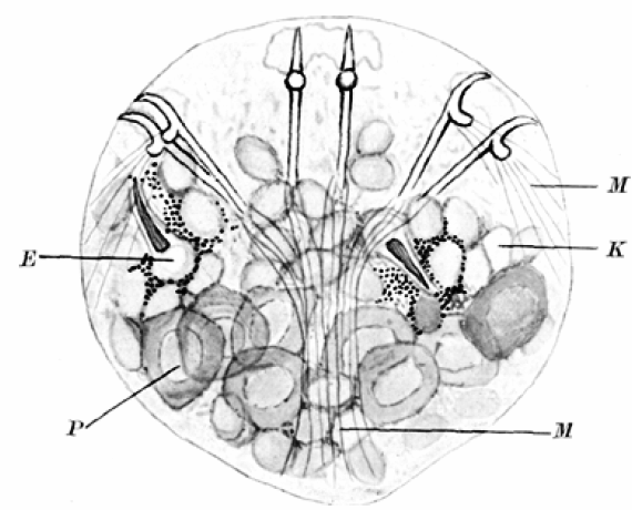 Koracidium Bruzdoglowca szerokiego.